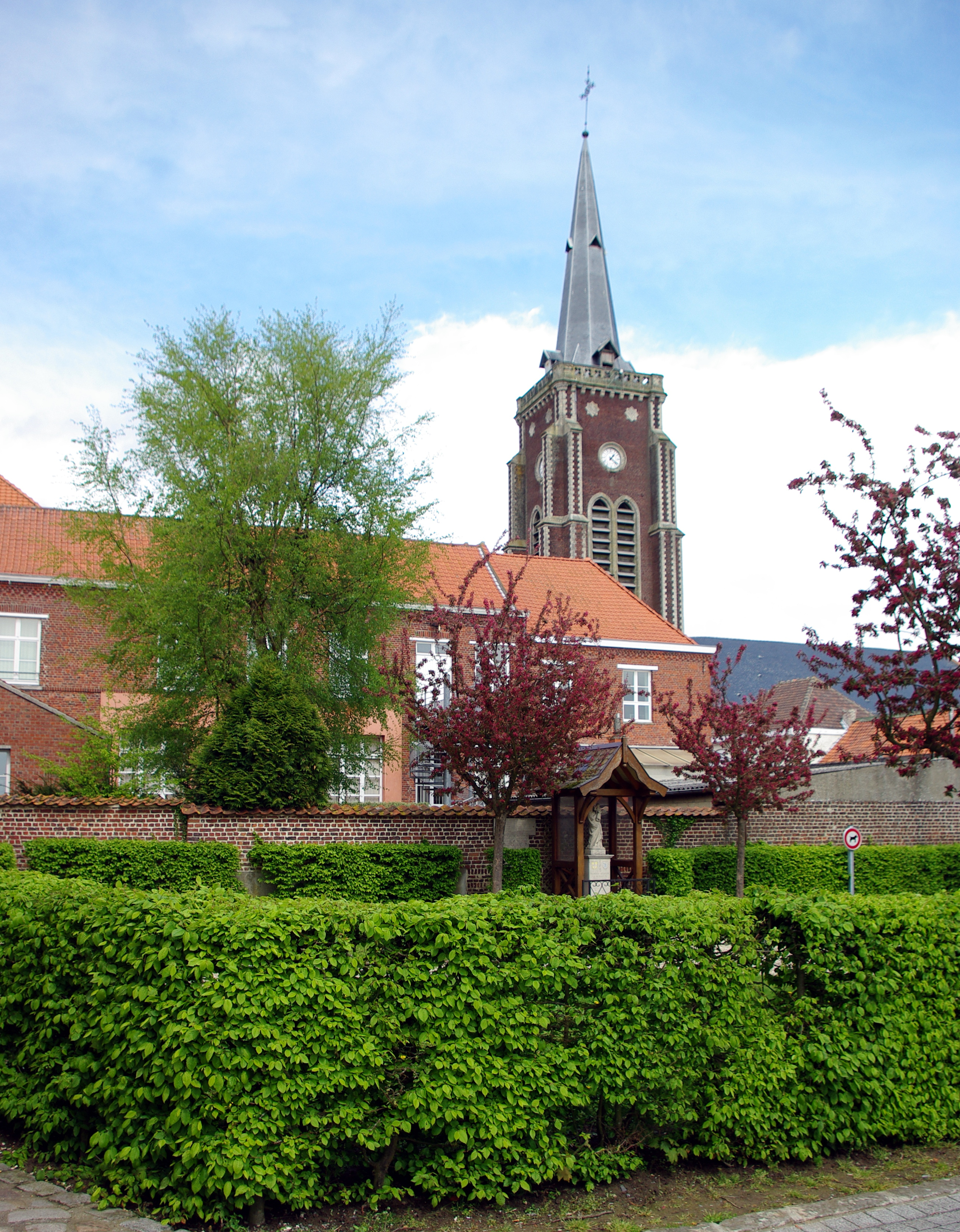 Eglise Saint Jean-Baptiste, Rue de l'Abbaye, Mons-en-Pévèle, département du Nord, région Nord-Pas-de-Calais, France